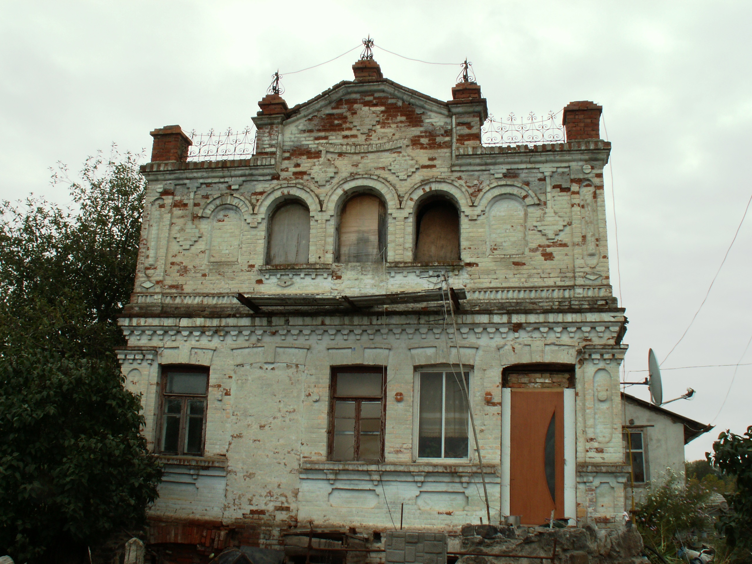 Voroshylivka Ukraine Former Synagogue